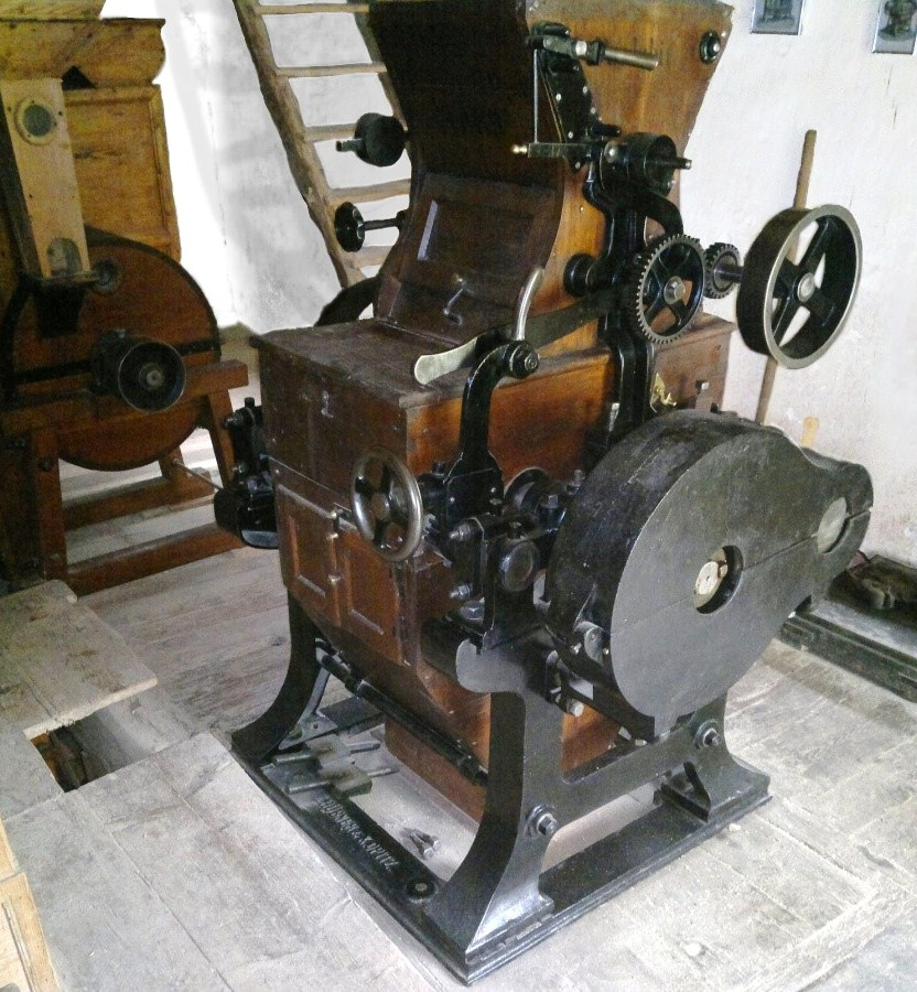 Válcová mlecí stolice fa J. Hübner a K. Opitz - Pardubice z roku 1890, technický unikát.